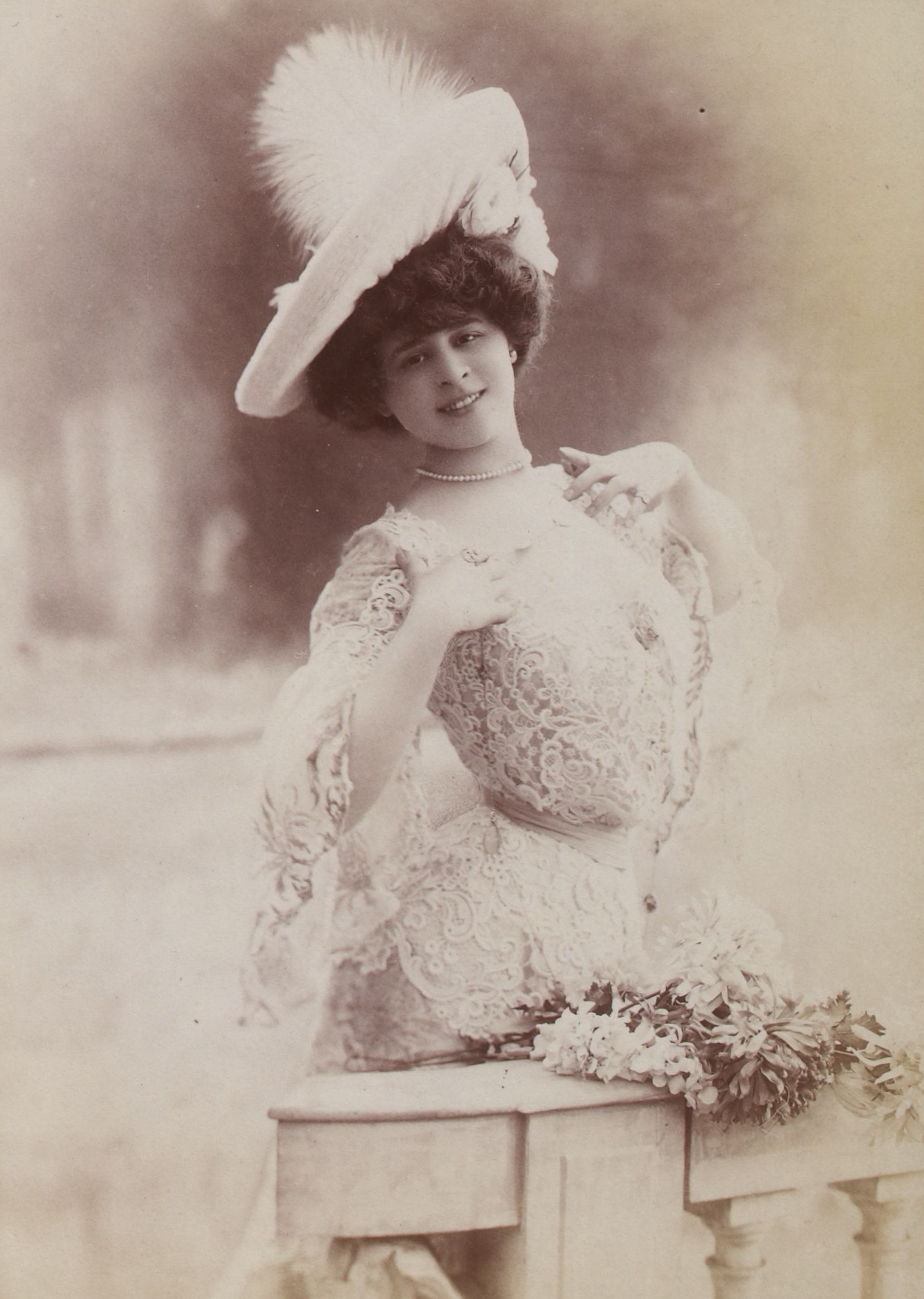 Album Reutlinger de portraits divers, vol. 21 : [photographie positive] : Élise de Vère.